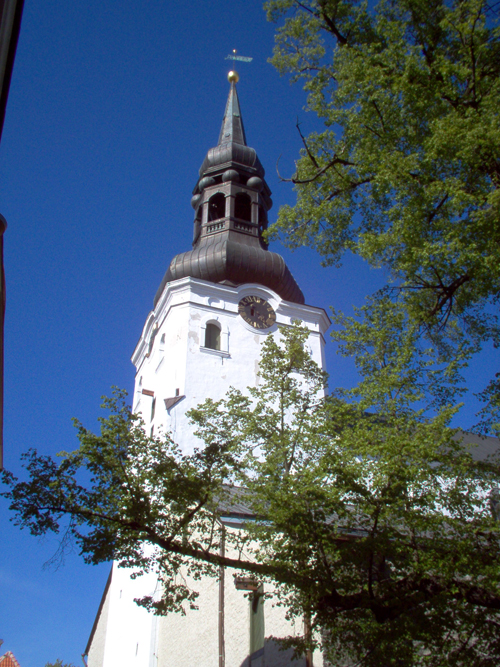 Tallinna toomkirik.